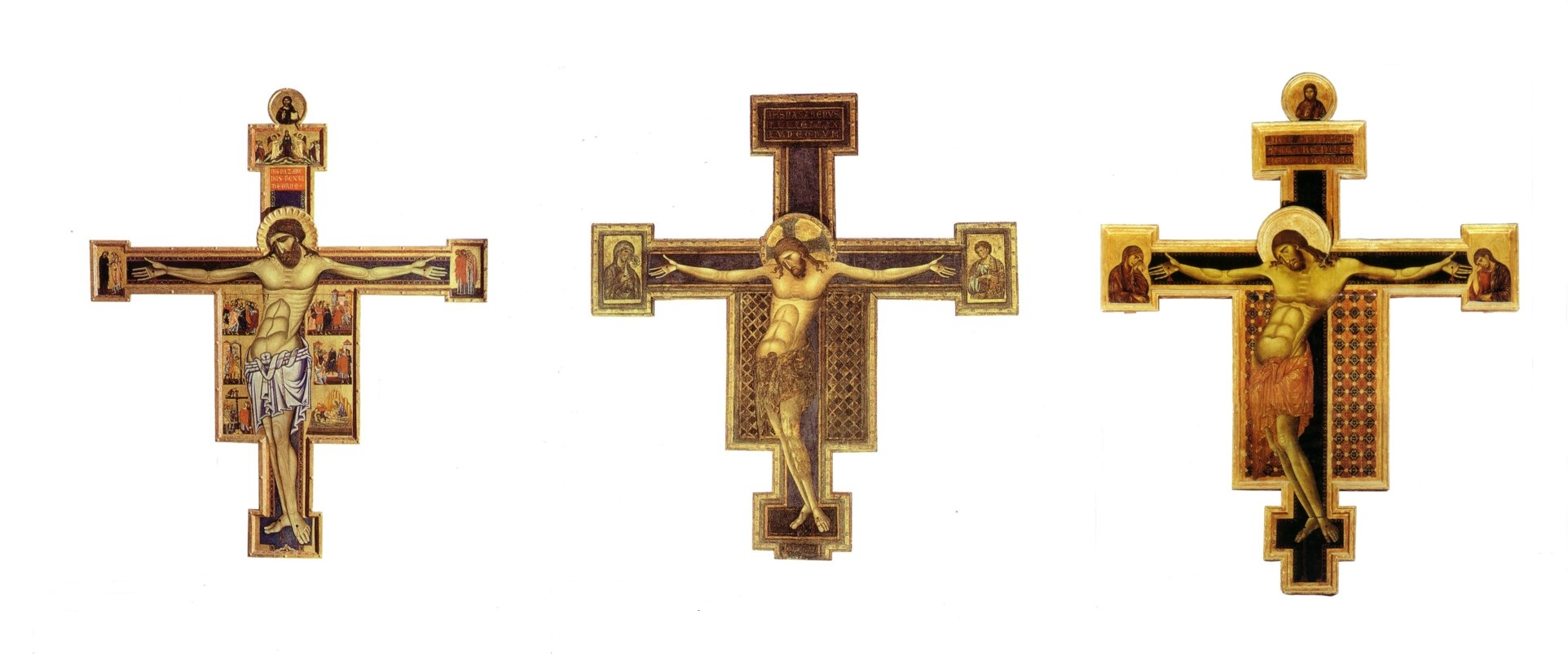 Comparaison des 3 crucifix (rendus approx. à la même taille): Coppo di Marcovaldo, Crucifix de San Gimignano (c. 1270) 296 x 247 cm Giunta Pisano, Crucifix de Bologne (c. 1250) 336 cm × 285 cm Cimabue, Crucifix d'Arezzo (c. 1265-1270) 336 x 267 cm